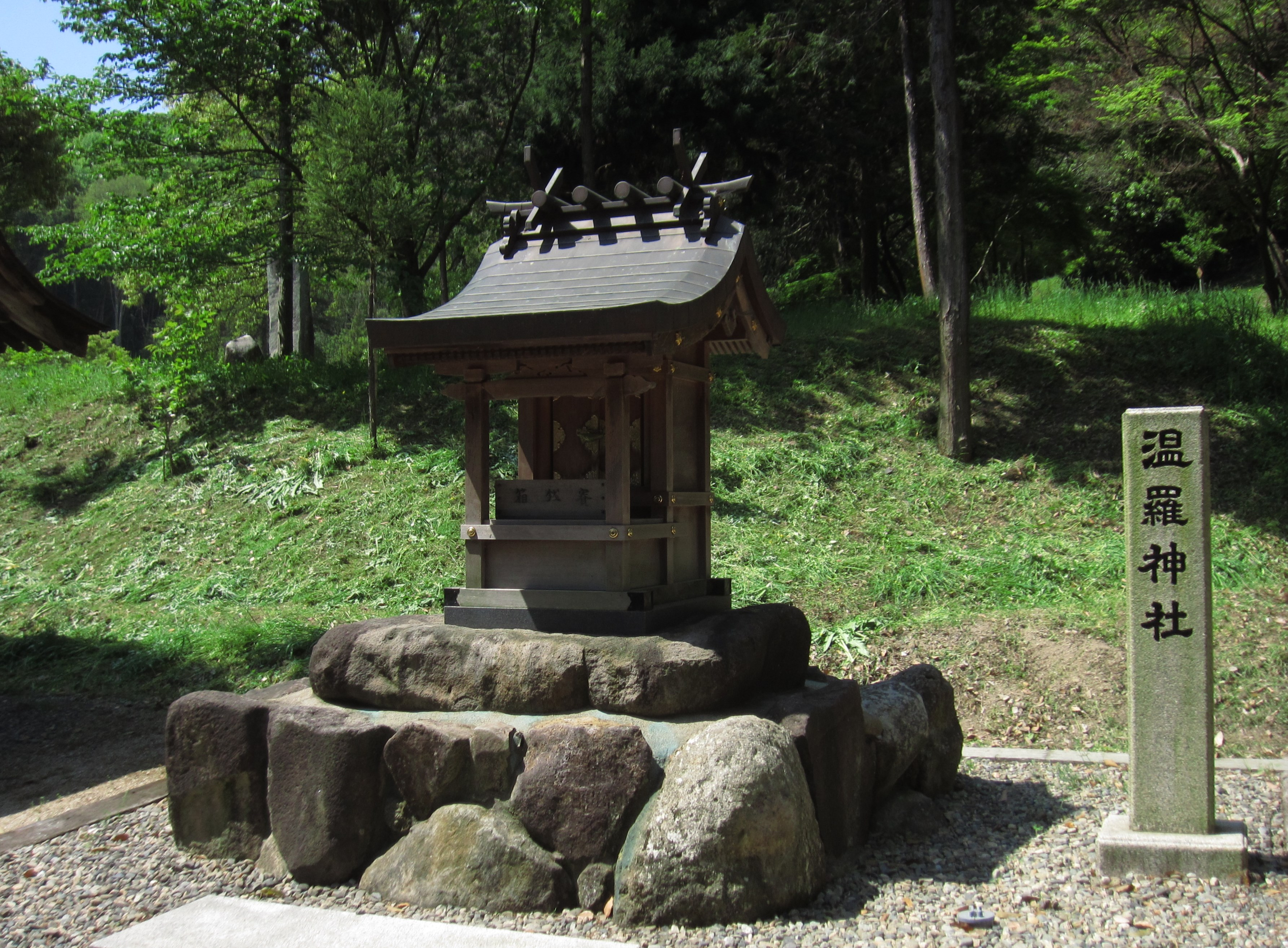 温羅神社 (吉備津彦神社摂社)